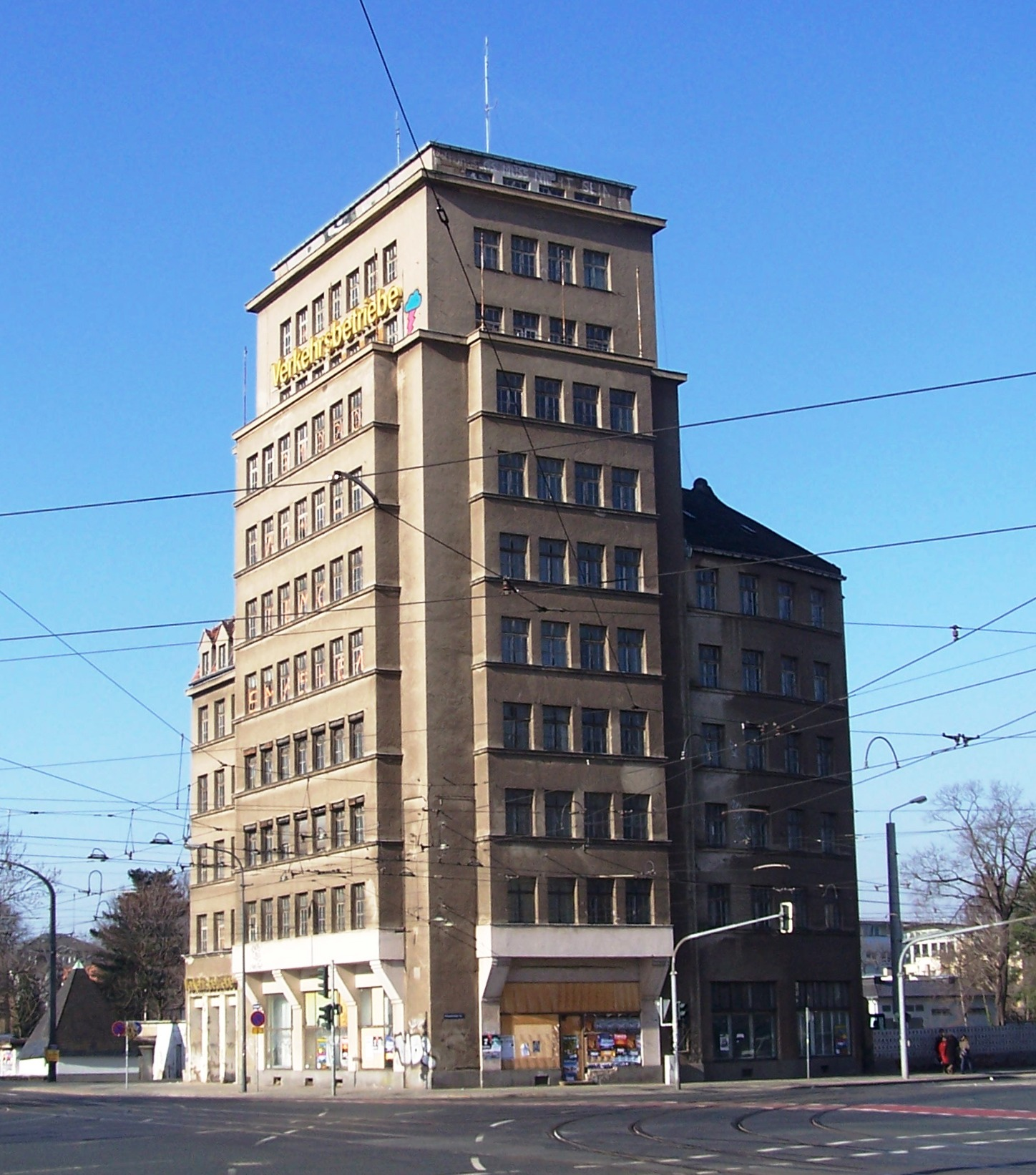 Dresden, Hochhaus am Albertplatz